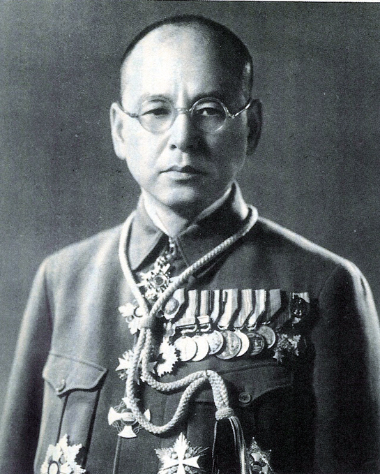 協和服姿の甘粕。